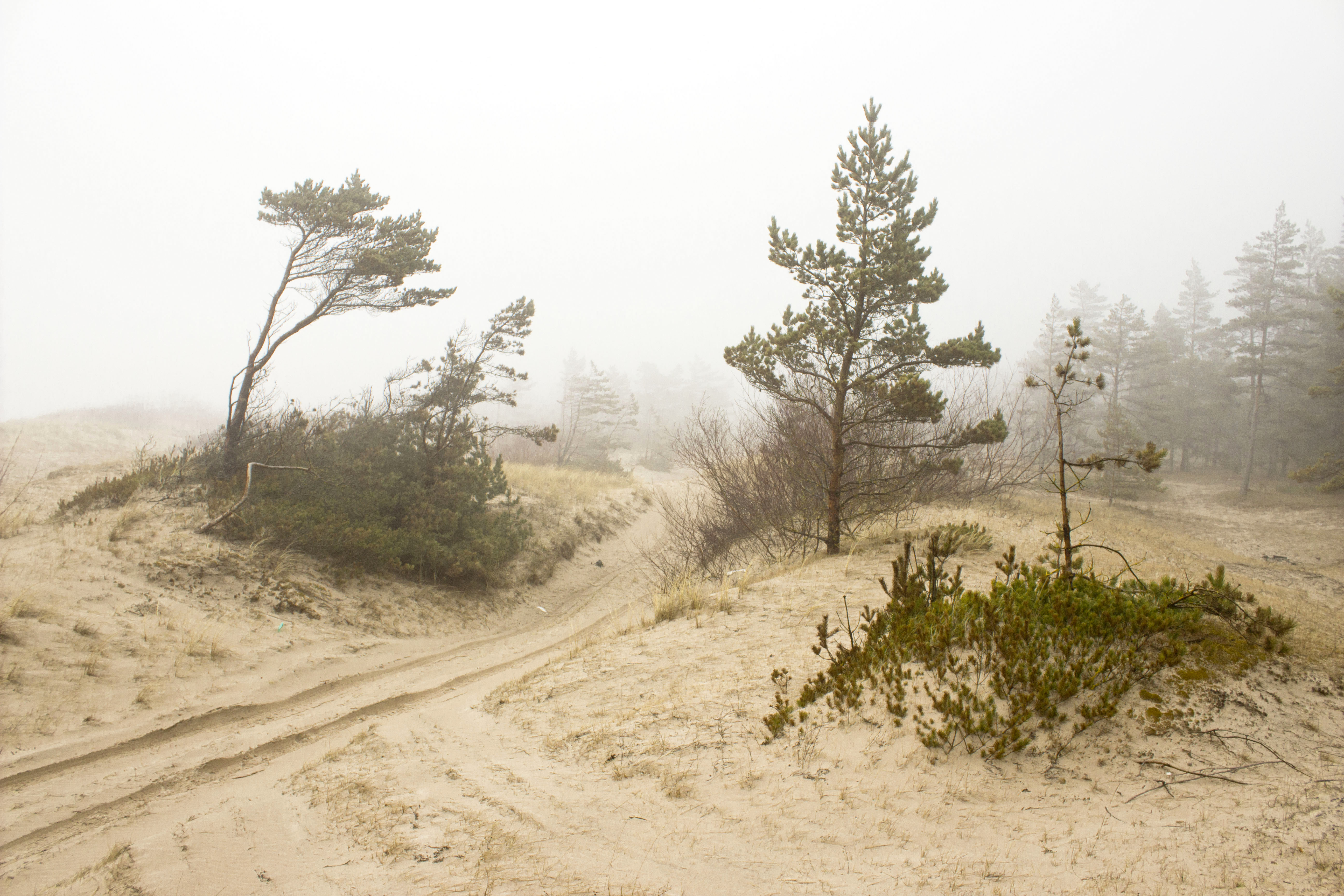 Foggy day